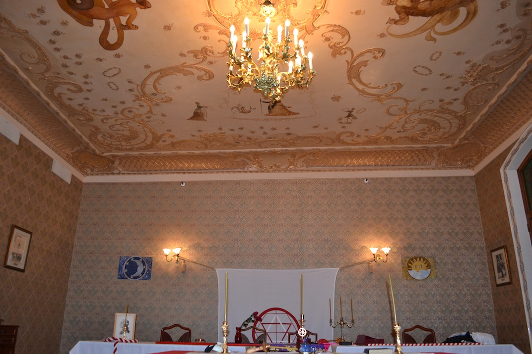 Убранство Лож Автономного Суверенного Древнего Ордена Мартинистов-Мартинезистов ( в ходе очередного торжественного собрания в отеле Метрополь, Москва, Россия, 5 апреля 2013 года. (По другим данным — любительская реконструкция убранства мартинистской ложи).